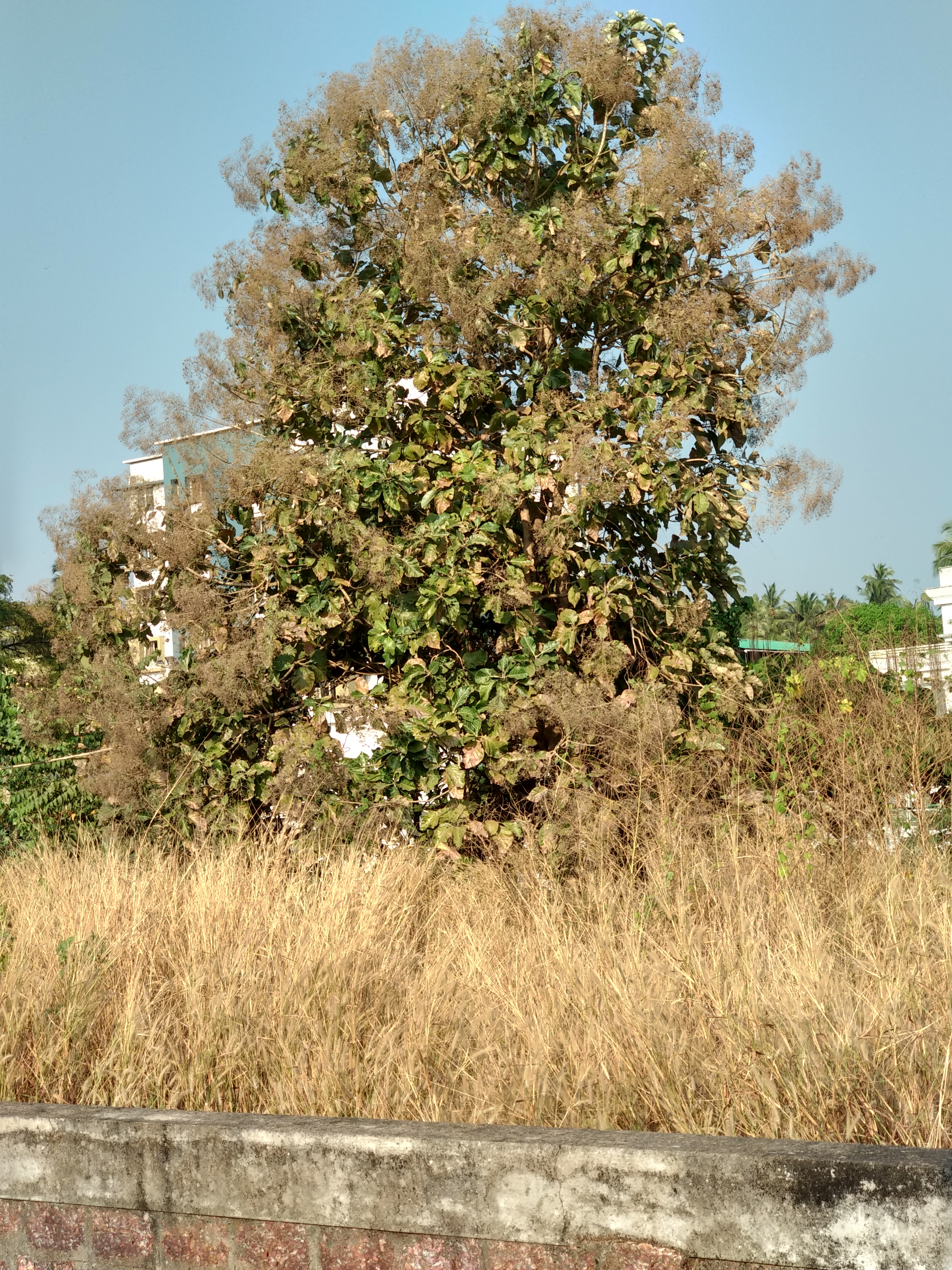 കാസർഗോഡ് റെയിൽവേ സ്റ്റേഷൻ പരിസരത്തെ പരുത്തി മരം